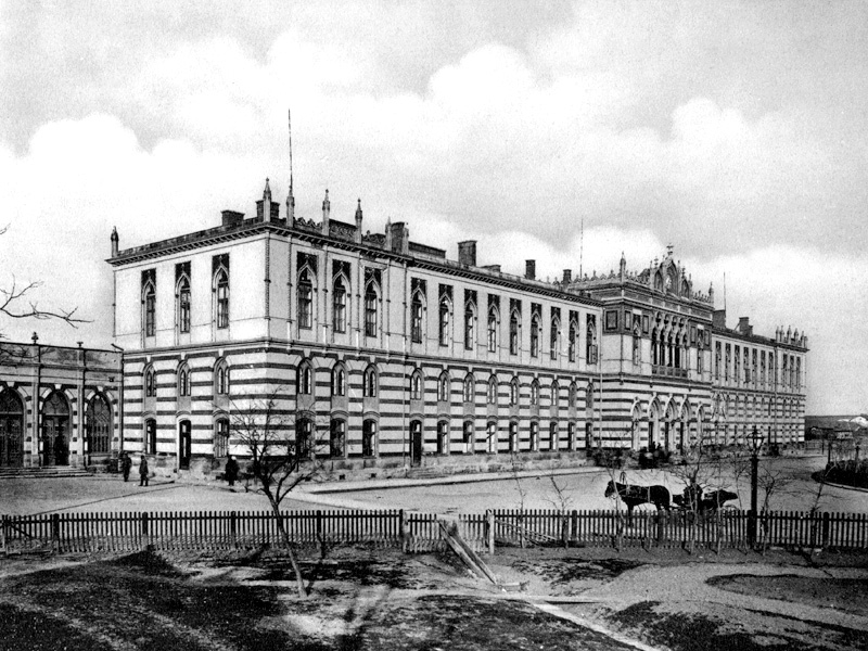 Iaşi train station